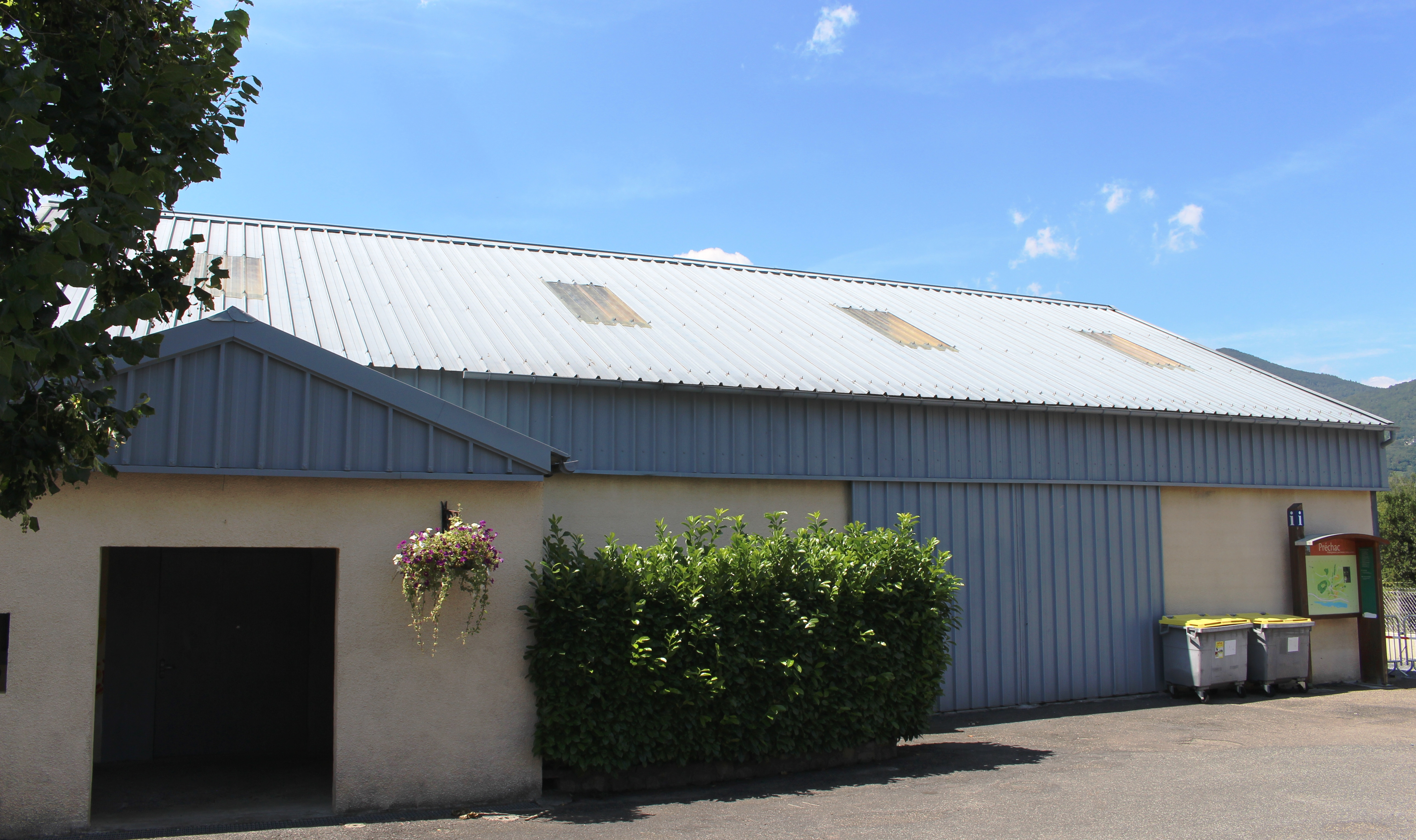 Salle des fêtes de Préchac (Hautes-Pyrénées)